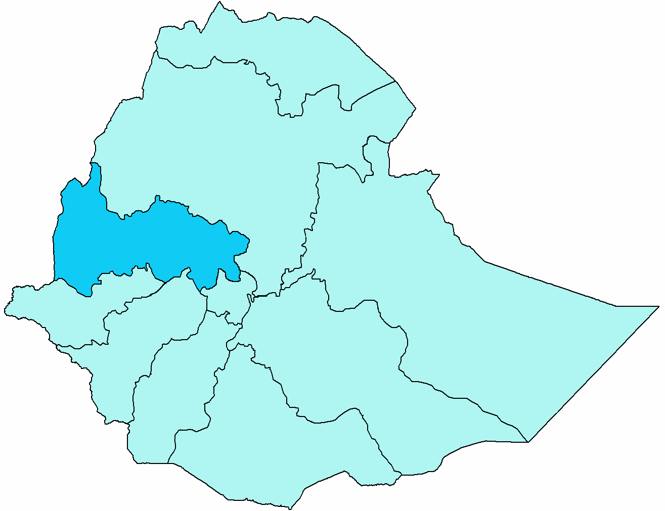 Mappa del vicariato apostolico di Nekemte. Fonte per i confini della diocesi: Ethiopian Catholic Church.